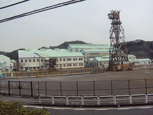 浦賀船渠の様子